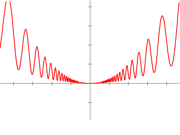 f(x)=2x2(1+sin(1/x))+x2, f(0)=0. Ebben az esetben a próba nem alkalmazható, bár a függvénynek a 0 pontban minimuma van